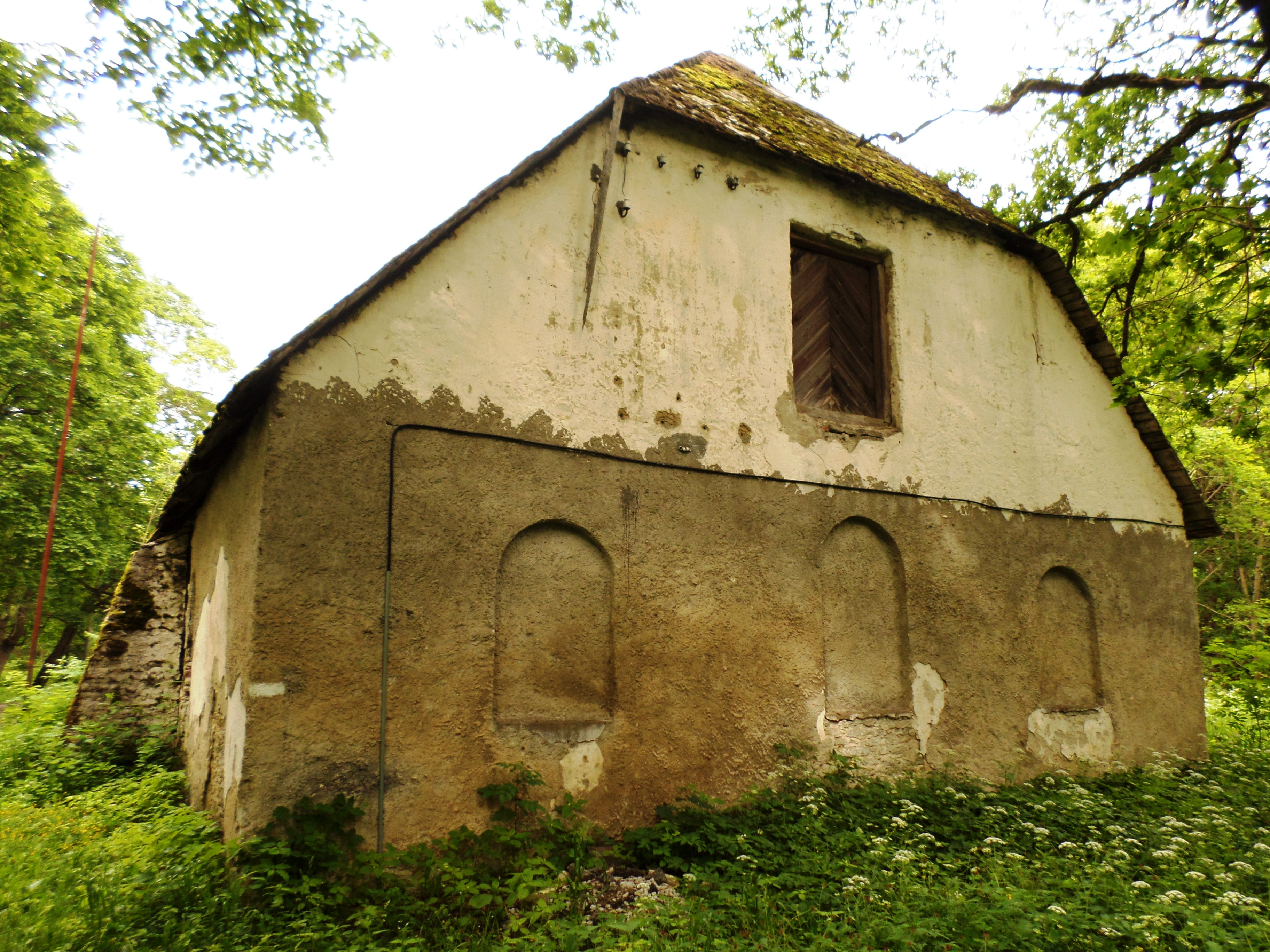 Harku mõisa ait.